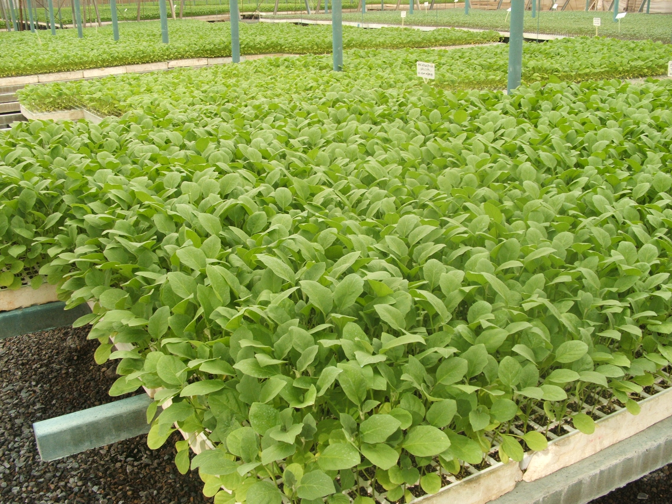 Interior de un semillero.